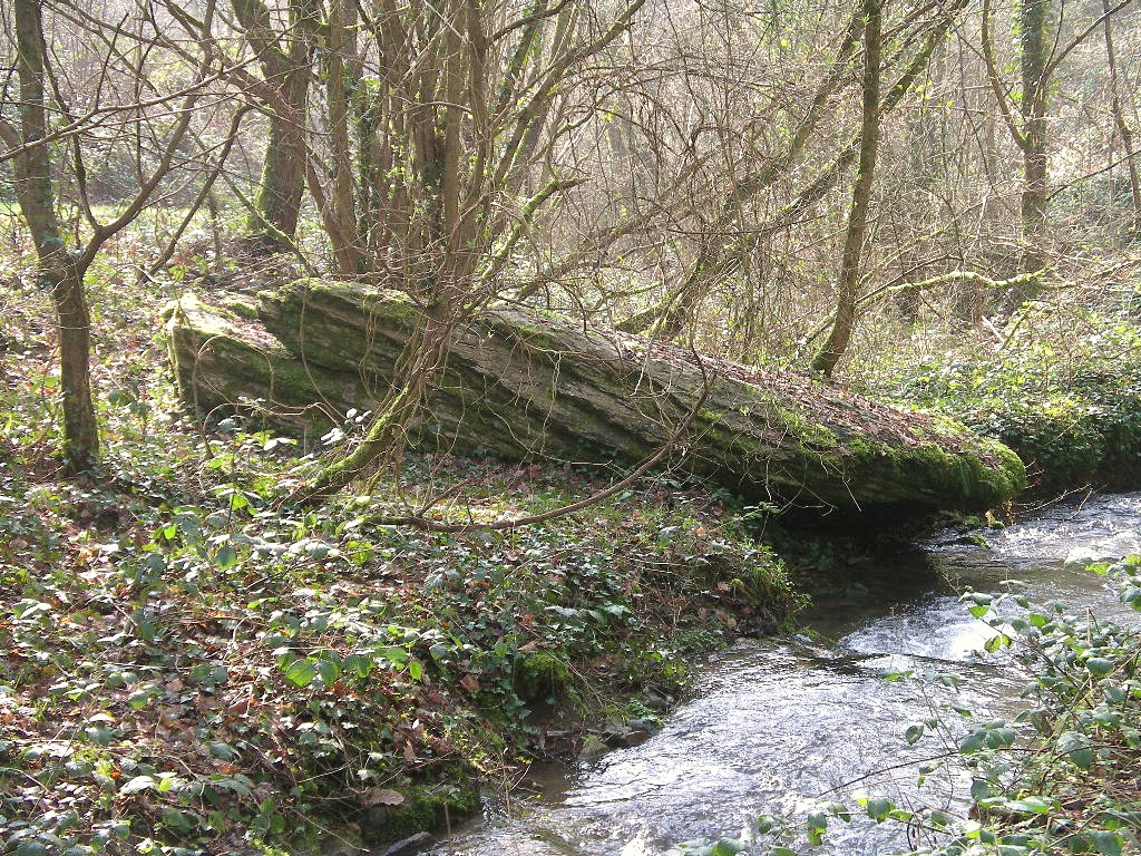 Menhir renversé à Culey-le-Patry, Calvados au bord du ruisseau Herbion.